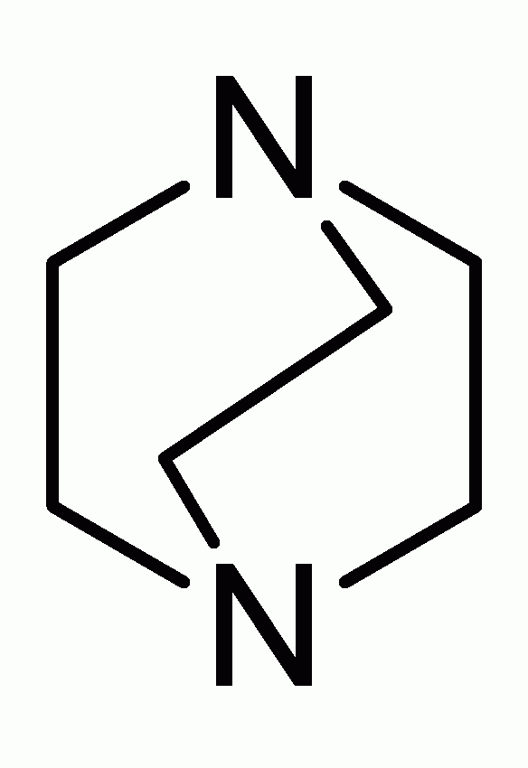 Dabco